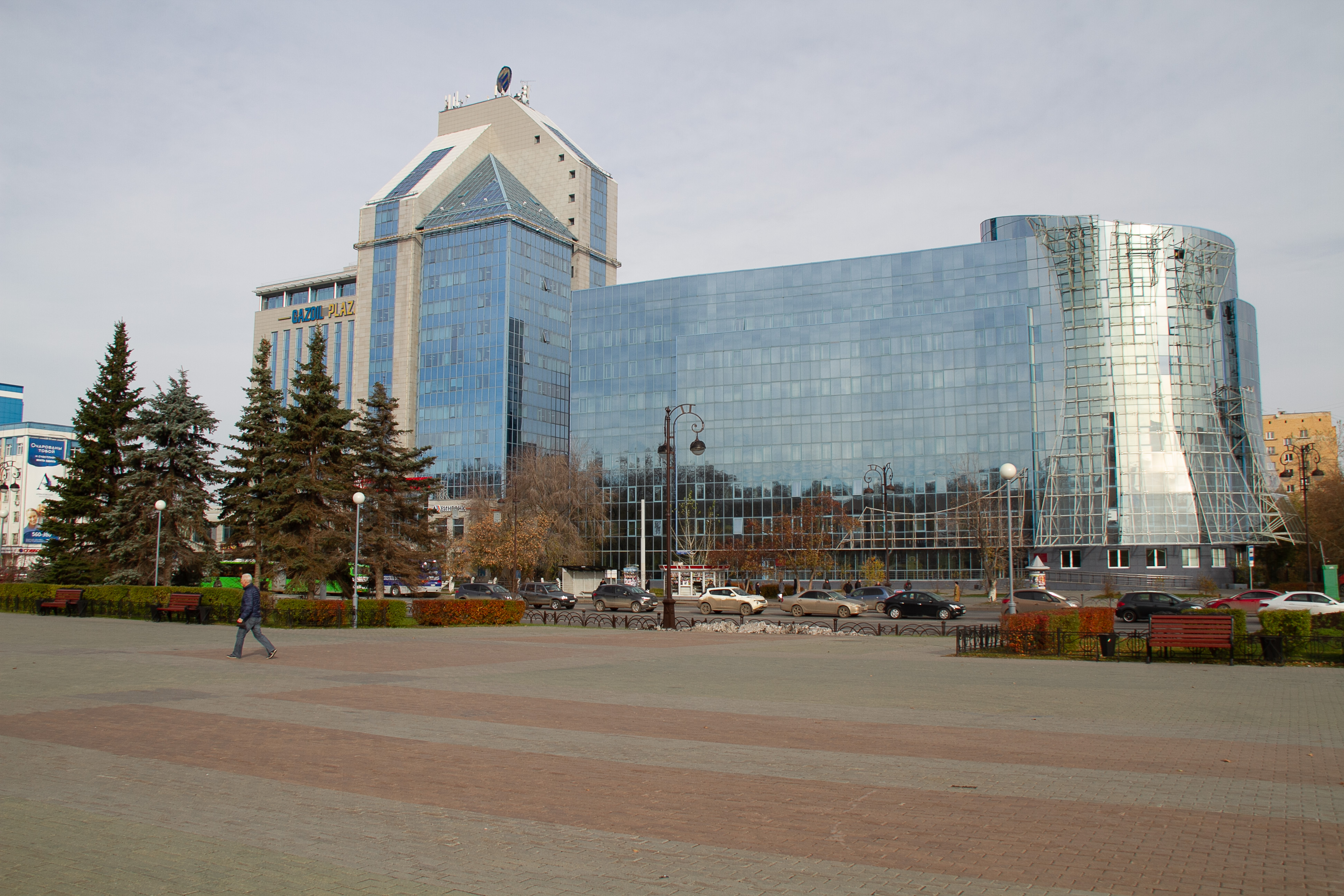 Бизнес-центр «ГазОйлПлаза».